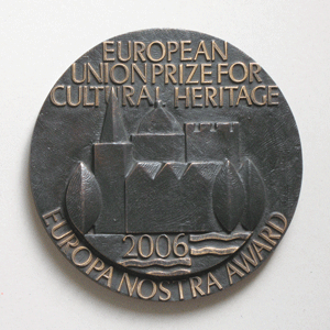 Europa Nostra Prisen